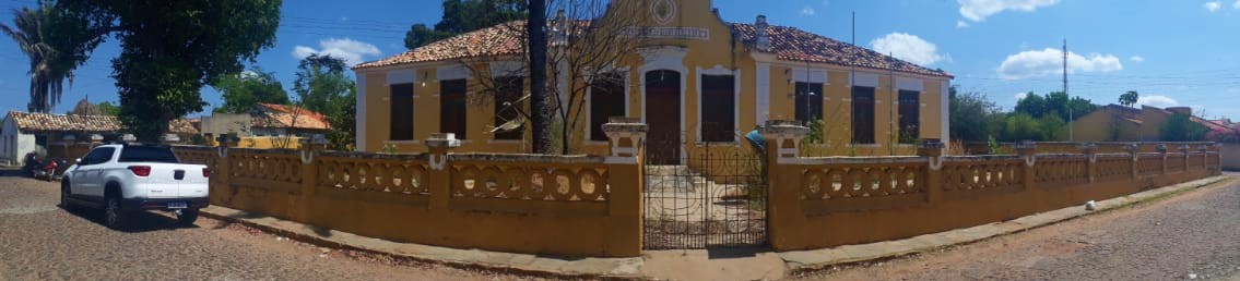 Escola Anísio Brito de Piracuruca pertencente à Secretaria de Educação do Estado do Piauí.